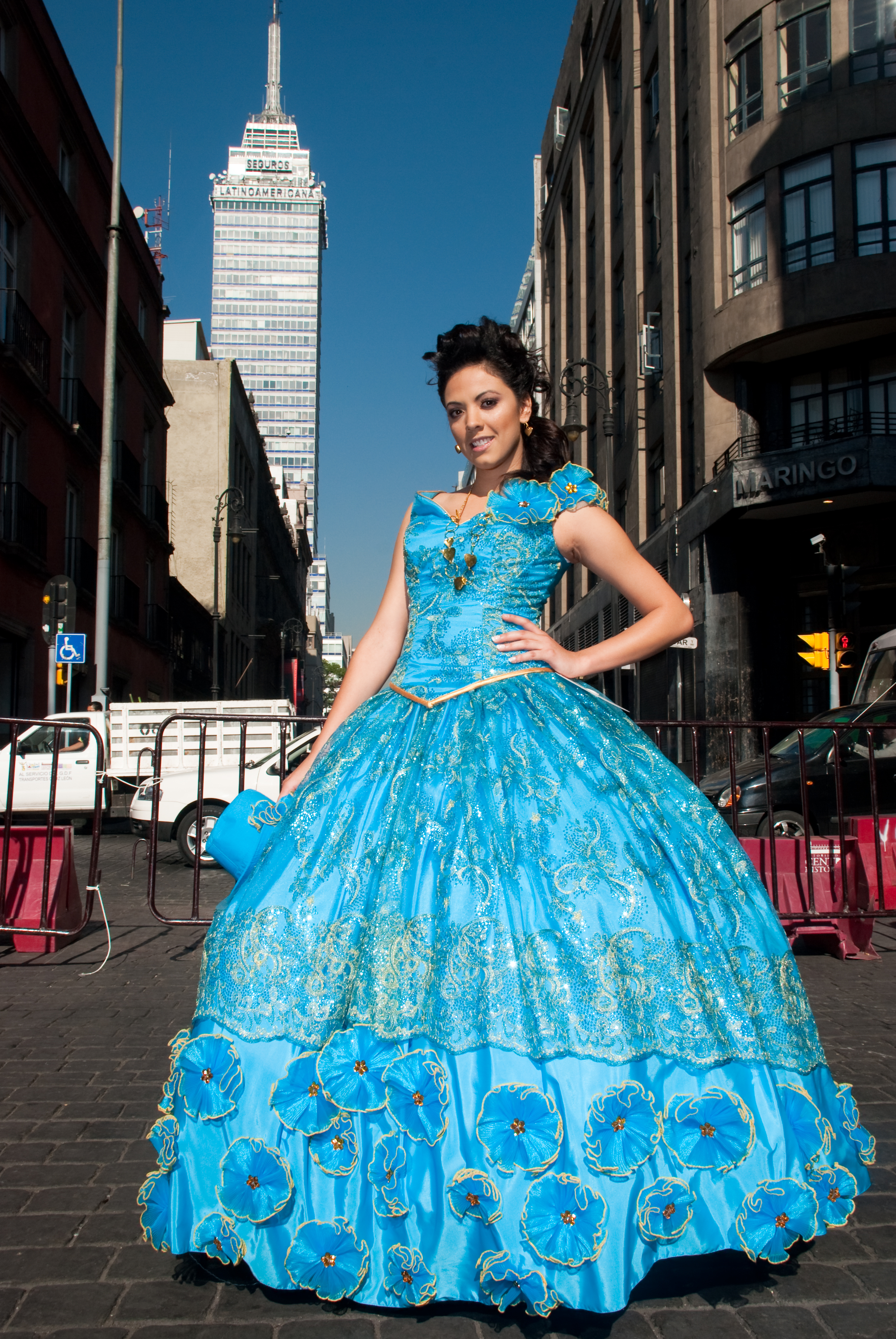 Este año, la pasarela fue en la calle de Madero para aprovechar que en Abril será totalmente peatonal (subirán el nivel de la calle para igualarlo al de las banquetas para mejorar la circulación peatonal). Fue un evento muy bien organizado, a los medios les gustó mucho.